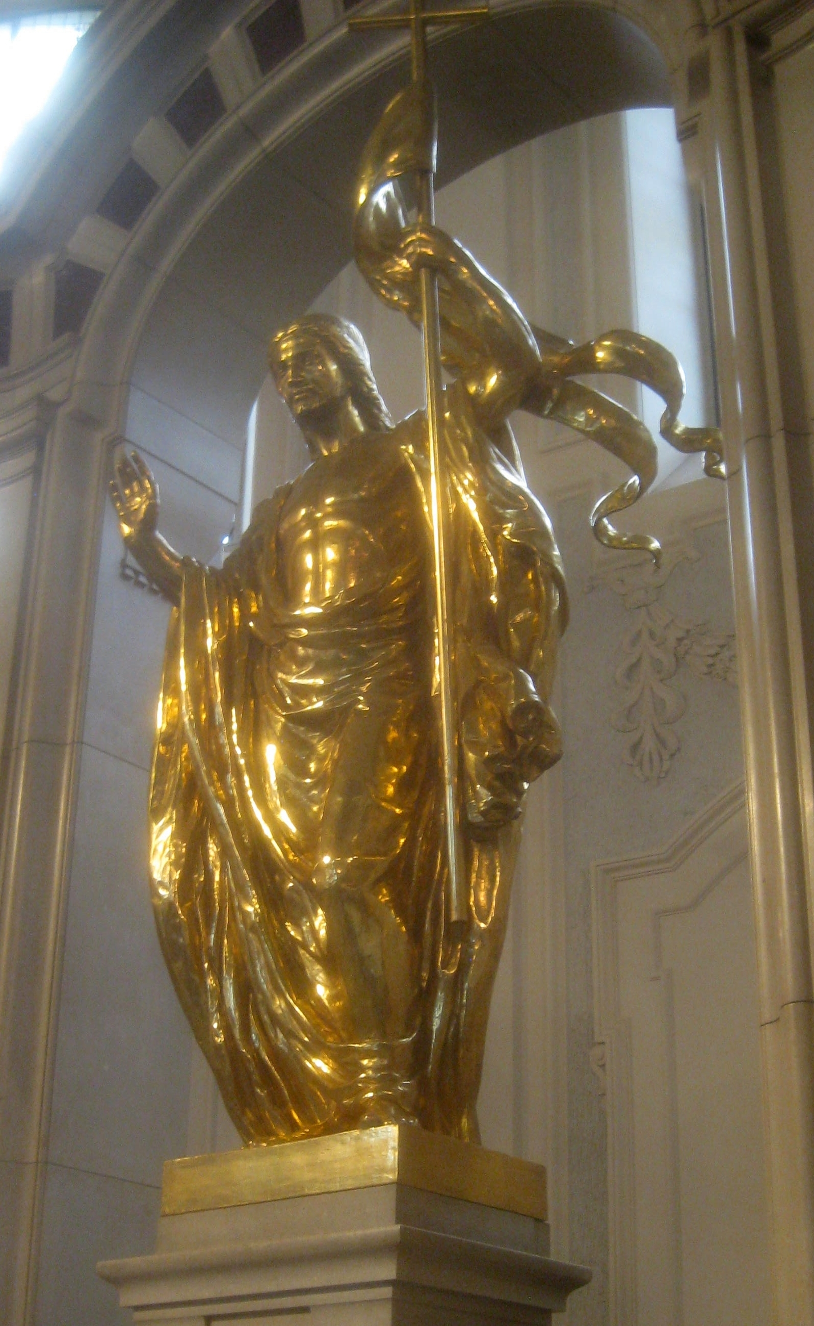 „Christus mit der Siegesfahne“ („Goldener Christus“) von Hermann Lang (Bildhauer) unter dem Triumphbogen des Hochaltars der Friedenskirche (Ludwigsburg), vor 1907, Foto 2014.